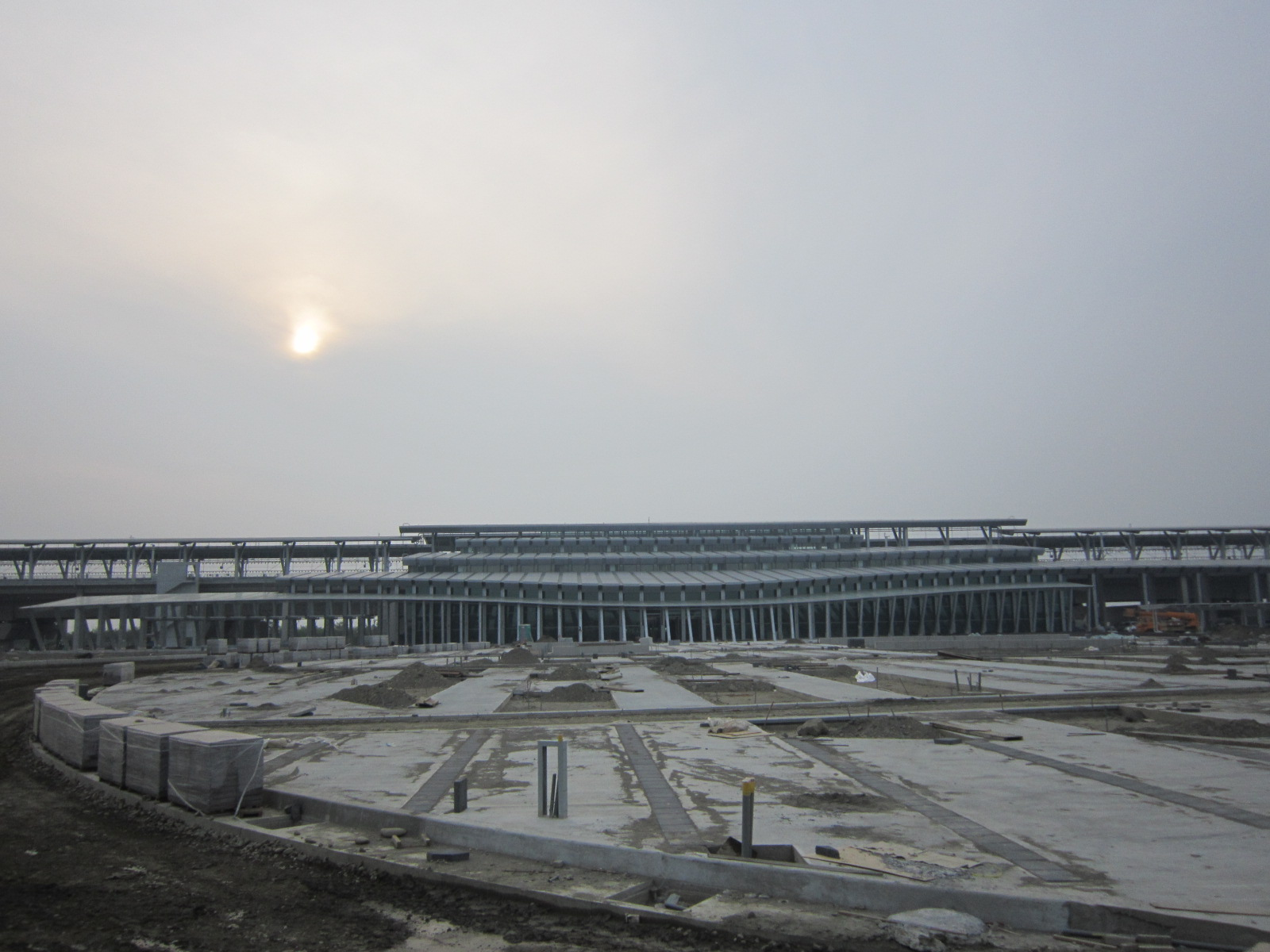 2015年4月14日台灣高鐵雲林車站興建中